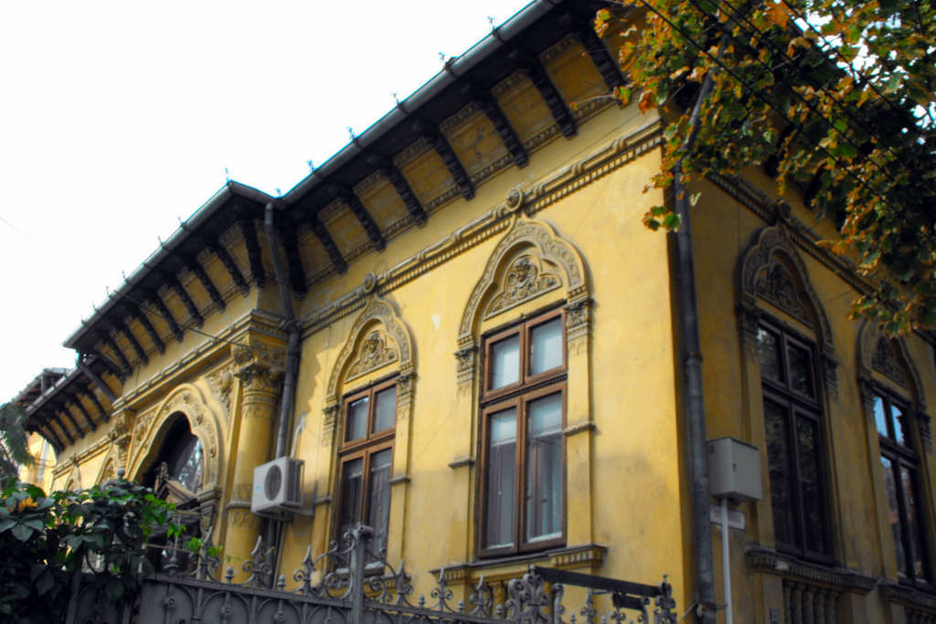 Polona 13